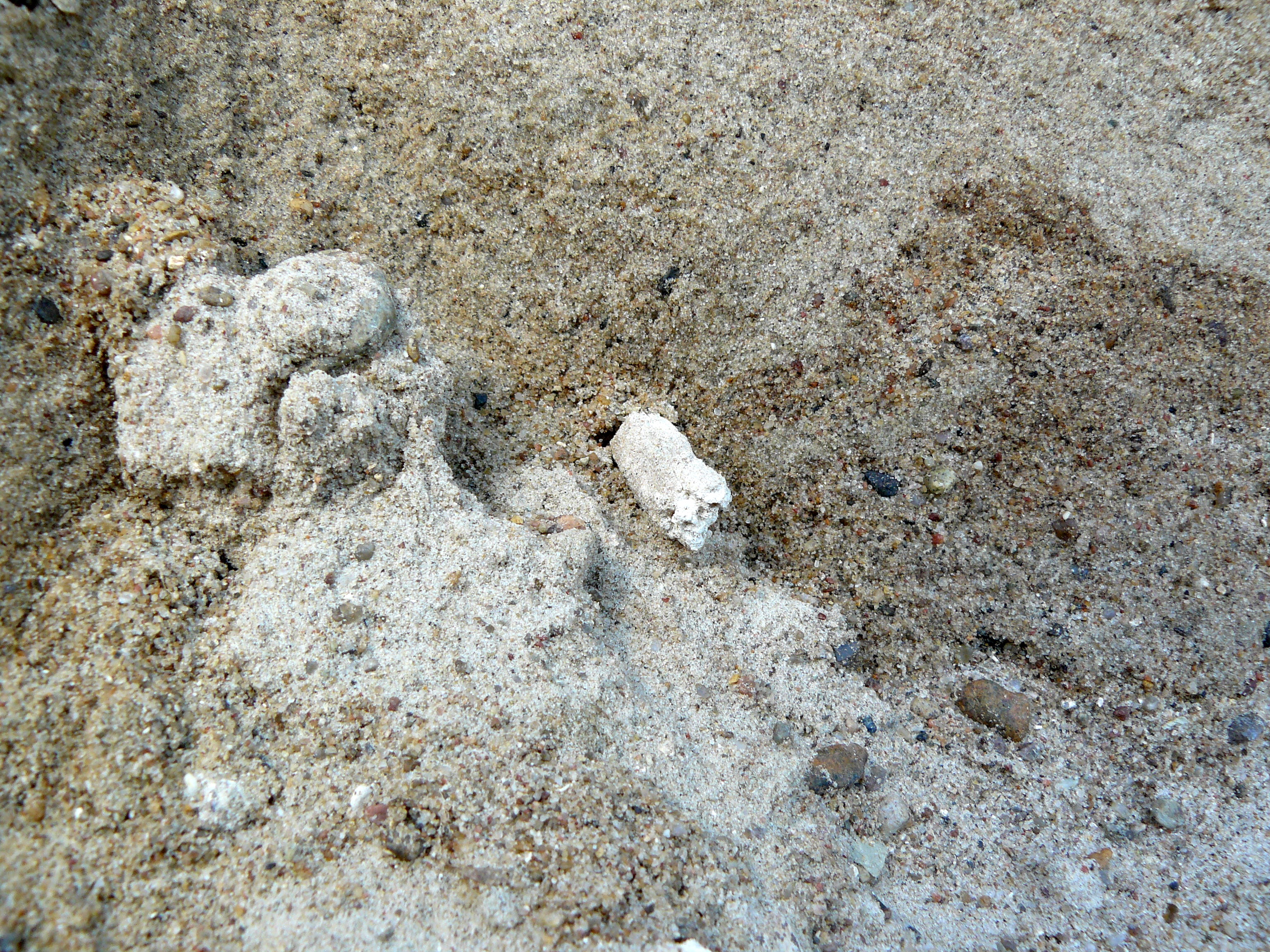 Osteokolle vom Dummersdorfer Ufer in Lübeck